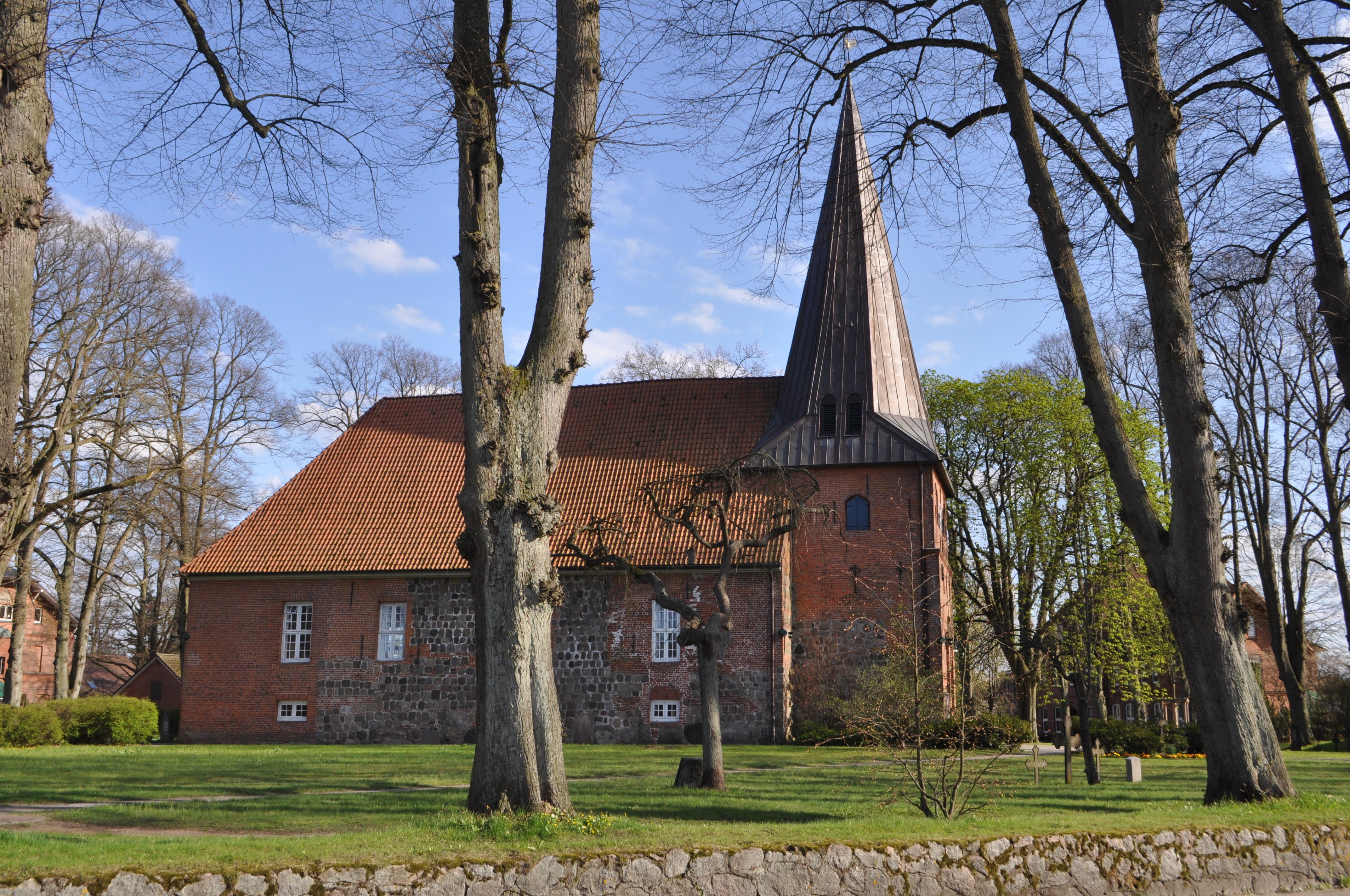 Kirche Bargteheide. This is a photograph of an architectural monument. .1